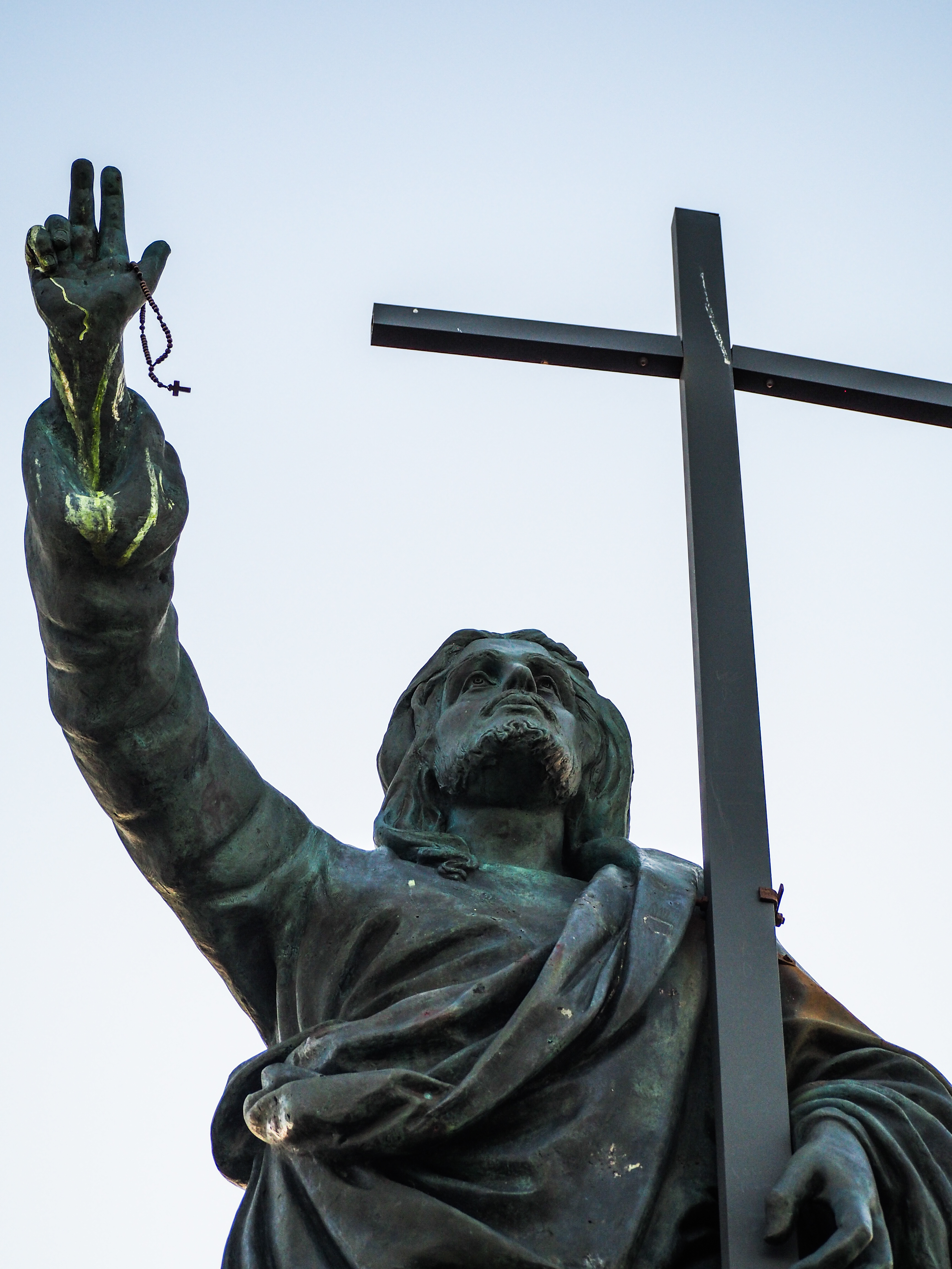 La statua del Cristo Redentore posta in cima all'inizio del '900